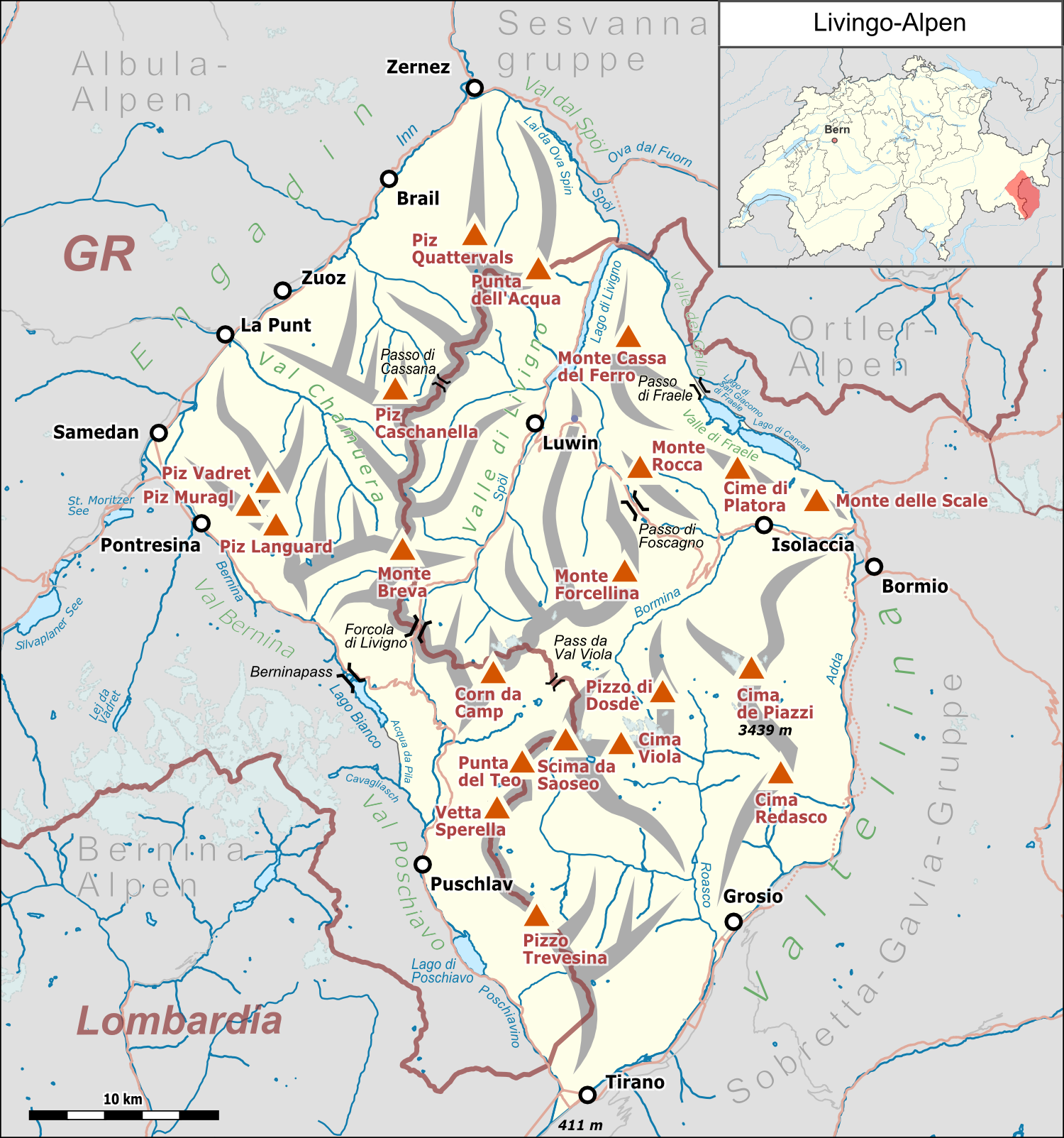 Lagekarte der Livigno-Alpen